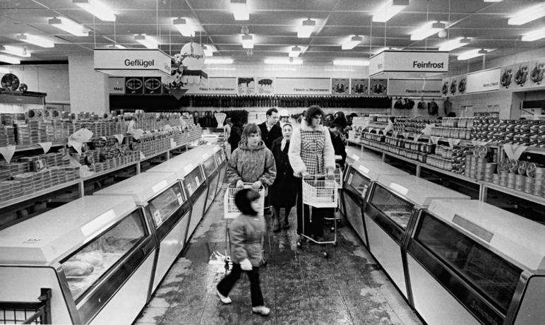 Berlin, Supermarkt ADN-ZB Junge 20.2.74-tu-Berlin: Konsum-Kaufhalle "Am Roederplatz" Vier Monate Bauzeit - das ist eine gute Leistung des Wohnungsbaukombinates und seiner Kooperationspartner. Durch ihre schnelle und saubere Arbeit und nicht zuletzt durch die gute Zusammenarbeit mit der Konsumgenossenschaft konnte am 25.1.74 die Kaufhalle "Am Roederplatz" im Neubaugebiet Weißenseer Weg-Leninallee eröffnet werden. Sie hat 1200 Quadratmeter Verkaufsraumfläche, auf denen 3750 Sorten an Waren des täglichen Bedarfs gehandelt werden.